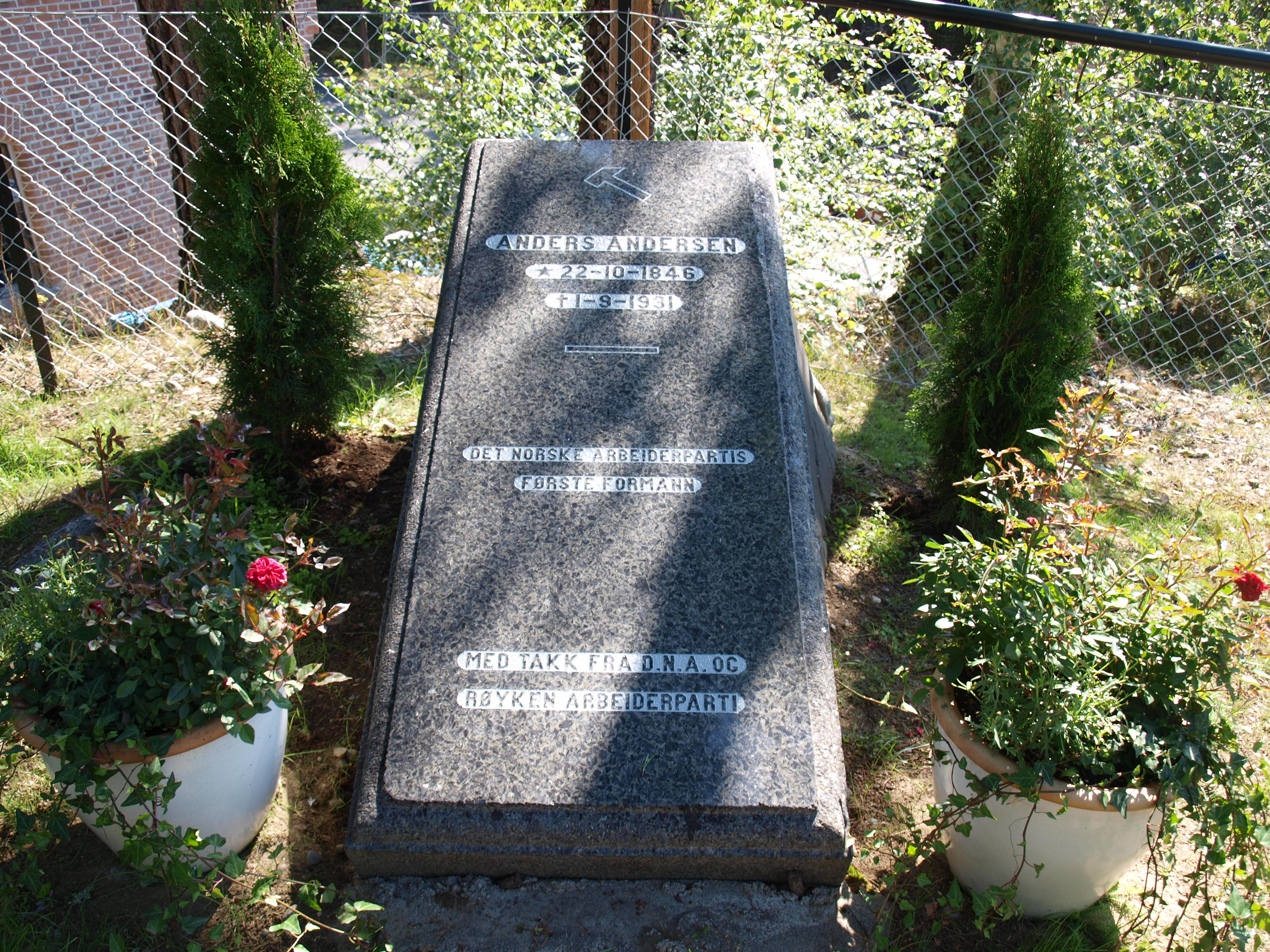 Minnestein over Anders Andersen, Arbeiderpartiets første formann.